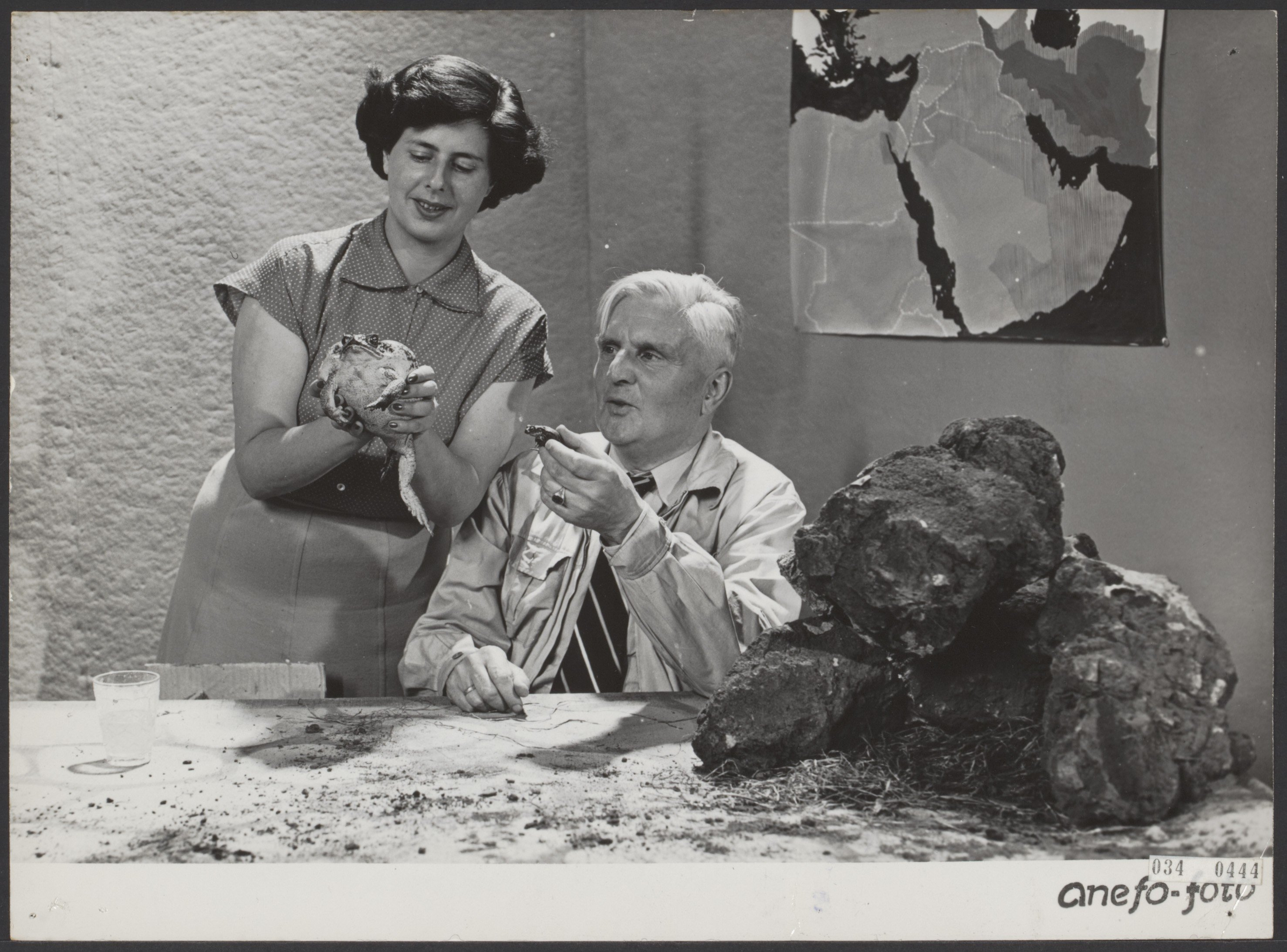 Collectie / Archief : Fotocollectie Elsevier Reportage / Serie : [ onbekend ] Beschrijving : Eerste AVRO televisie-uitzending. In het eerste AVRO programma, getiteld Televizier, debuteerde dr. Portielje (directeur van Artis) voor de camera in een programmaatje Artis-Ticiteiten. Dr. Portielje bracht dan ook een Braziliaanse reuzenpad voor de camera waarover hij een uiteenzetting bracht. Naast hem de eerste AVRO televisie-omroepster Netty Rosenfeld Datum : 5 oktober 1951 Locatie : Bussum, Noord-Holland Trefwoorden : dieren, omroepen, programma's, studio's, televisie Persoonsnaam : Portielje, A.F., Rosenfeld, Netty Fotograaf : Pot, Harry / Anefo Auteursrechthebbende : Nationaal Archief Materiaalsoort : Foto (zwart/wit) Nummer archiefinventaris : bekijk toegang 2.24.05.02 Bestanddeelnummer : 034-0444